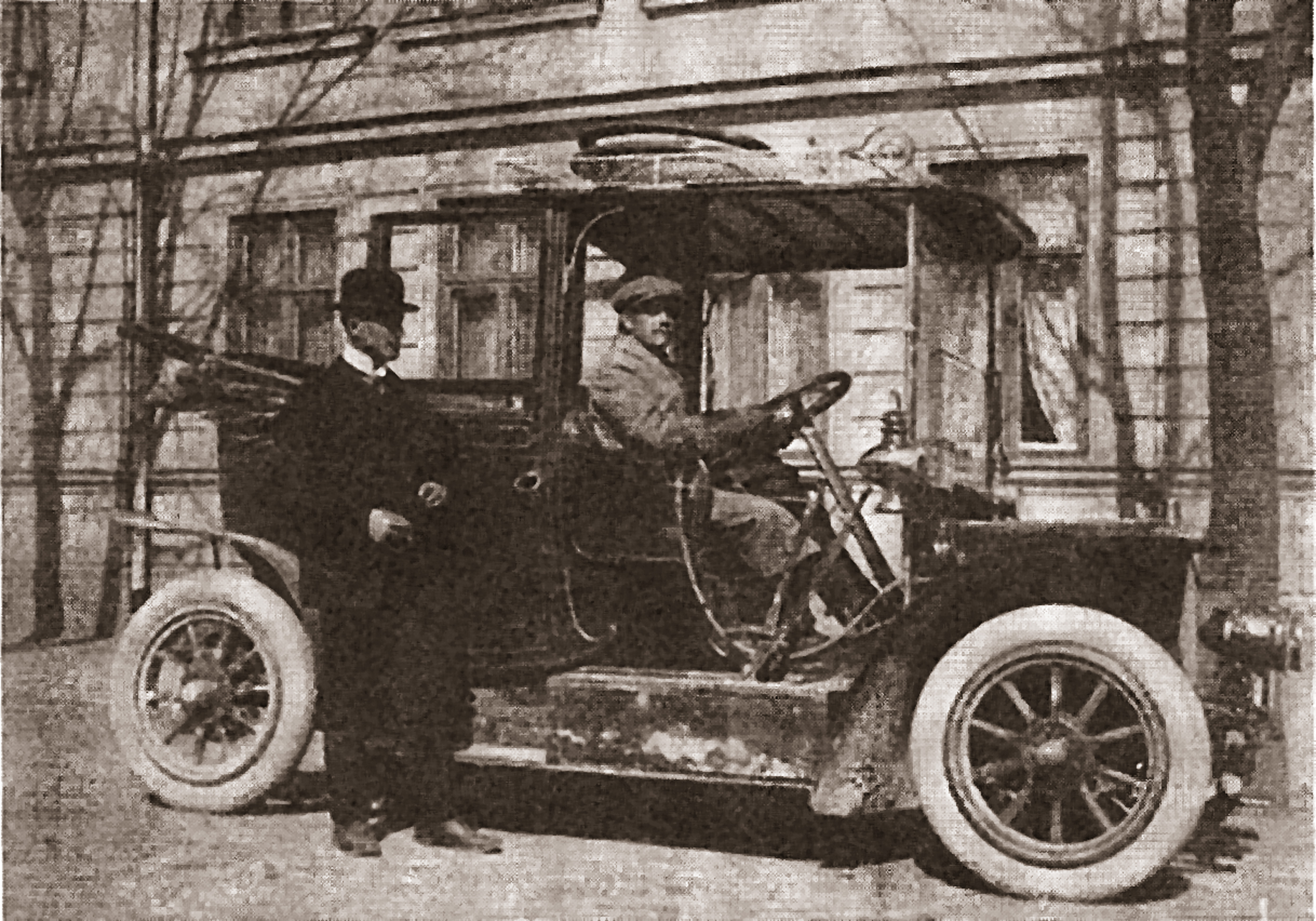 En trecylindrig Dürkopp modell 1906 som användes vid kurorten Sätra Brunn för transporter mellan kurorten och Sala, som den första trafiken mellan orterna. Fotograferad omkring 1915. Endast två bilar av detta slag lär ha funnits i Sverige.